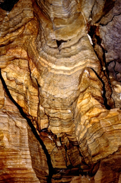 Spannagelhöhle